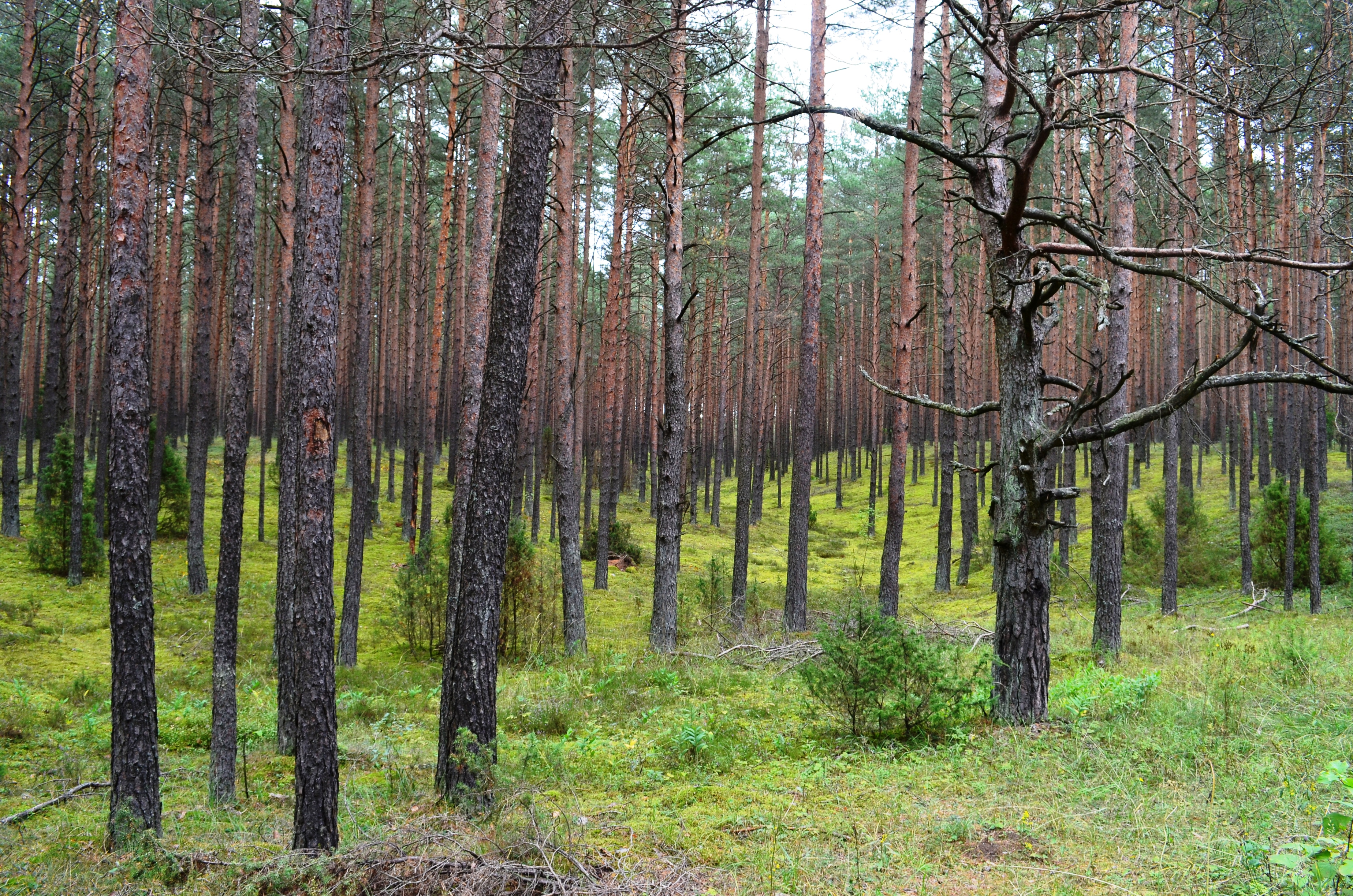 Įduba miške, Žemieji Karačiūnai, Antakalnio sen., Vilnius